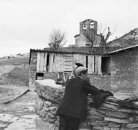 Imatge